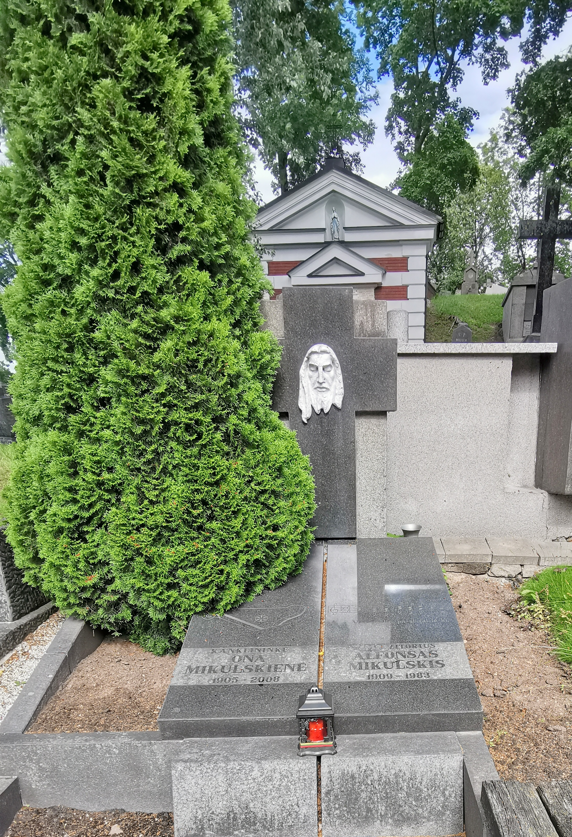 Alfonso ir Onos Mikulskių antkapis. Alfonsas Mikulskis (1909 m. spalio 14 d. Deglėnų k., Pušaloto valsč., Panevėžio apskr. – 1983 m. spalio 14 d. Klyvlende, JAV, 1994 m. liepos 2 d. palaikai perlaidoti Rasų kapinėse) – violončelininkas, dirigentas, kompozitorius, kultūros veikėjas, poetas, pedagogas. Žmona - Ona Mikulskienė.